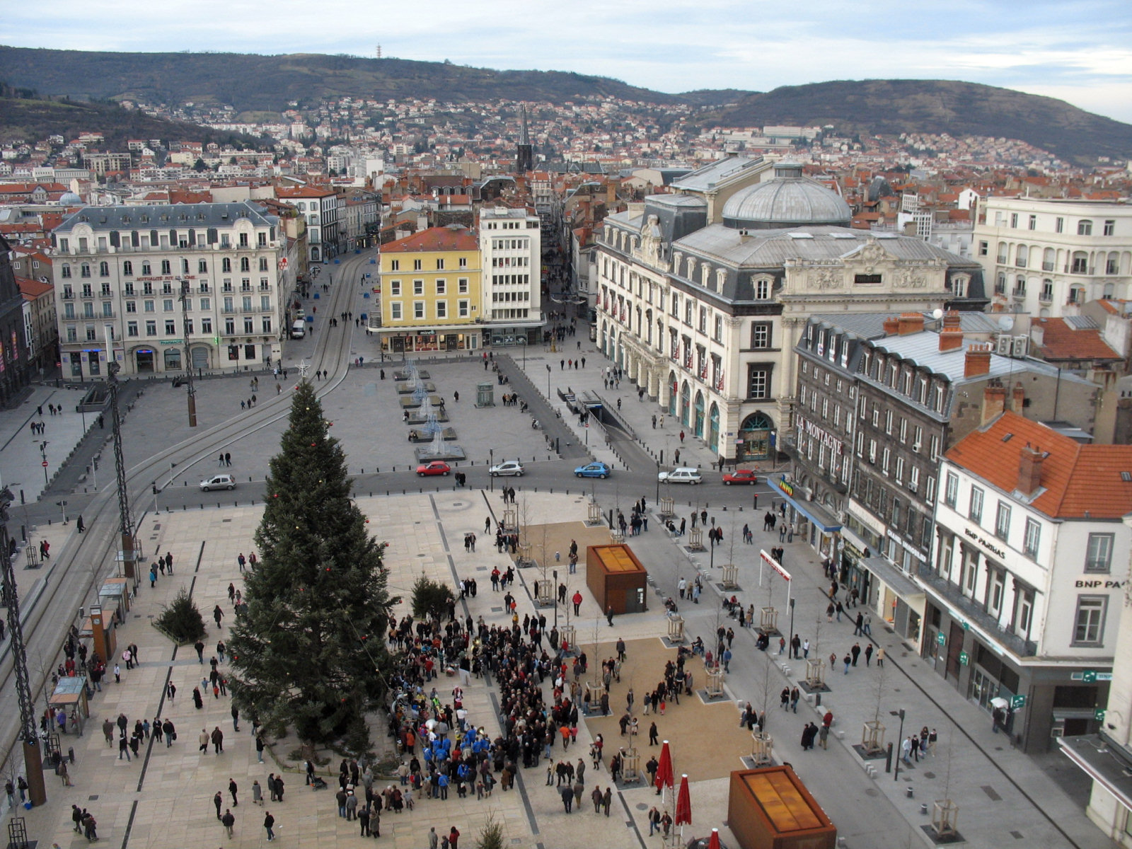 La Place de Jaude à Clermont-Ferrand